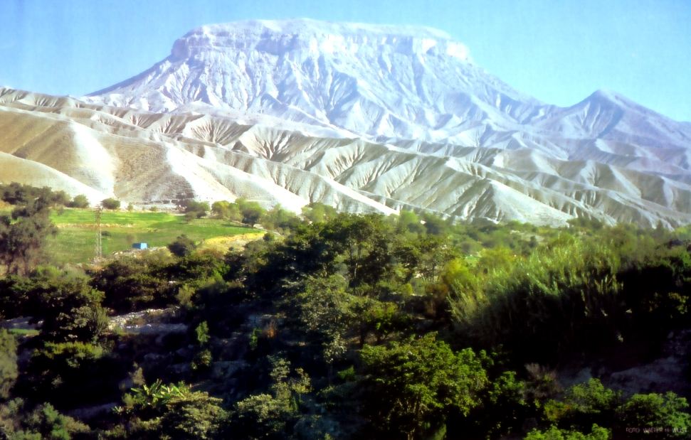 Cerro Baúl, yacimiento arqueológico de Perú situado en la cima aplanada de un cerro, en Moquegua. Cultura Huari e Inca.